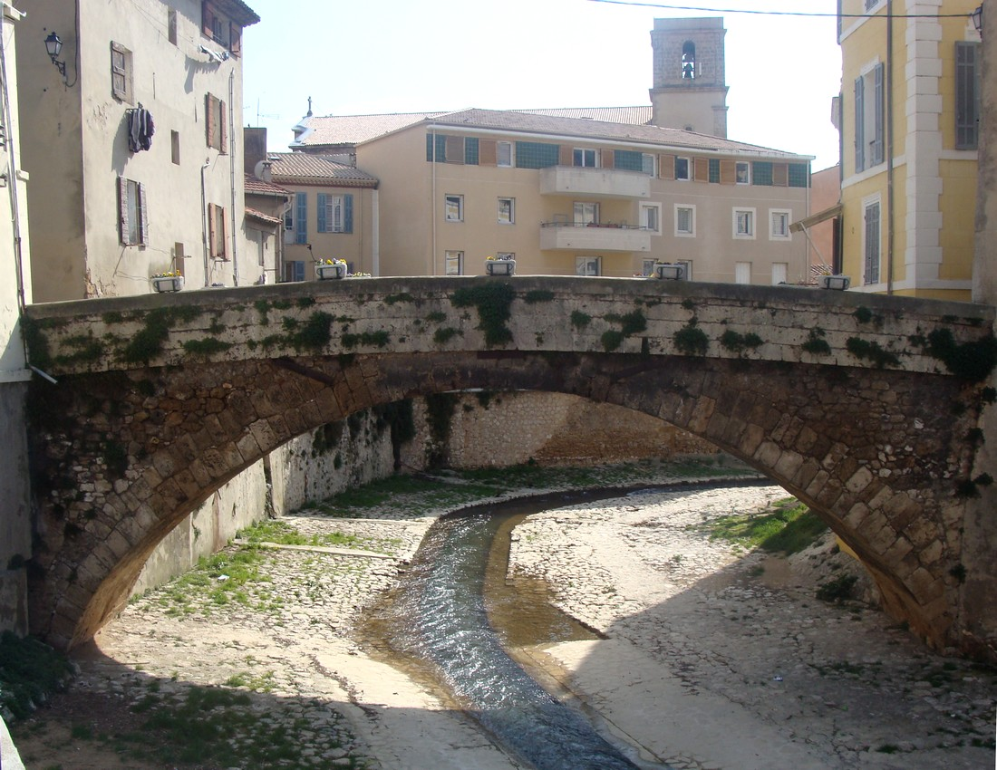 Le pont-vieux sur l'Huveaune, dit pont Bonaparte, à Roquevaire.